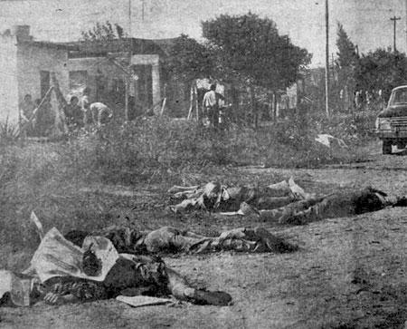 Imagen publicada originalmente en el suplemento fotográfico anual de El Auténtico Nº 8, vocero del Peronismo Auténtico (Montoneros), 24 de diciembre de 1975.